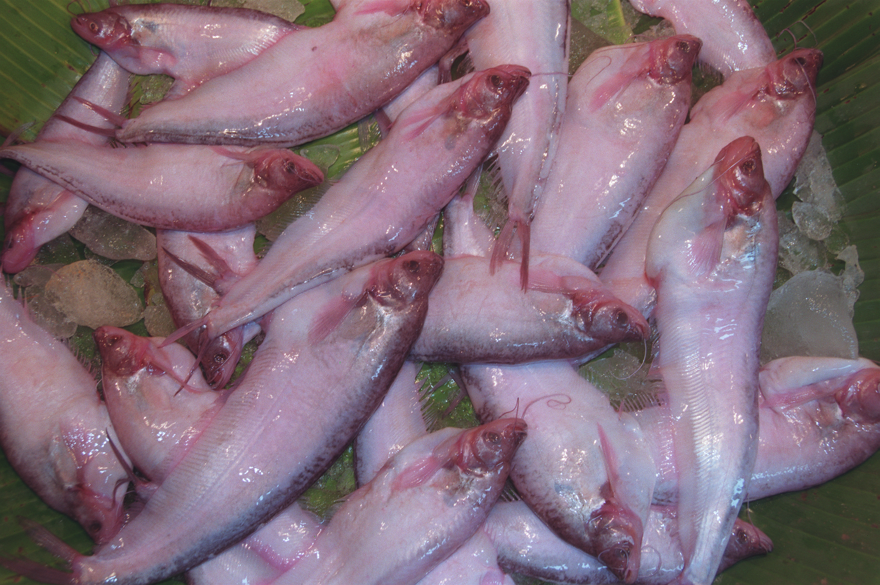 Pabda Catfish, Pabdah Catfish (in Bengali Madhu Pabda)